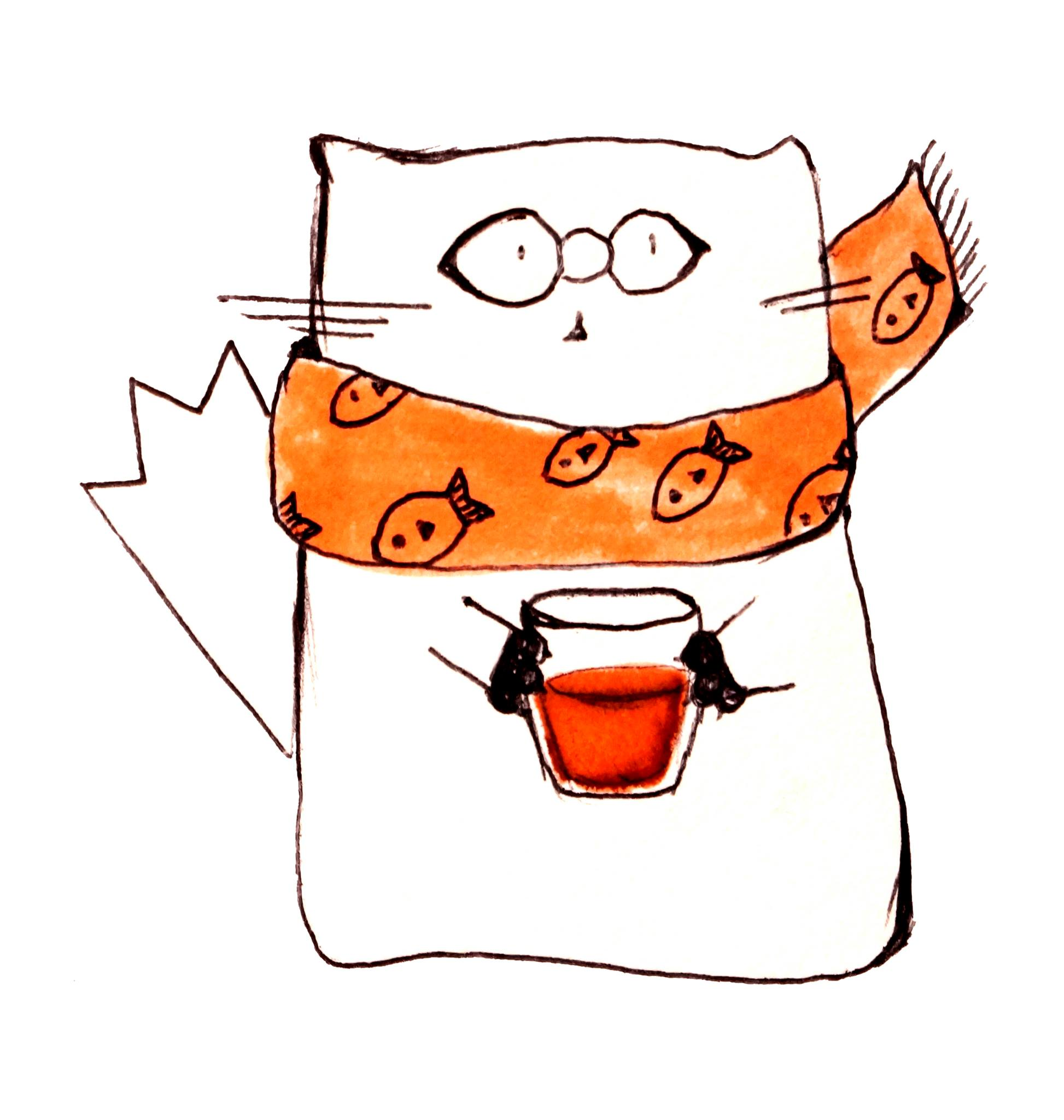 вигляд кота Інжира, буде використано для сторінки